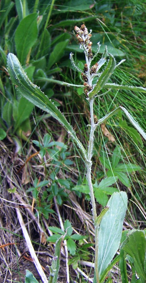 Gnaphalium norvegicum (pl. szarota norweska), habitat: Tatra Mountains, Opalony Wierch, Świstówka Roztocka